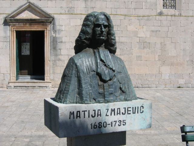 Фотография бюста, перед собором города Пераст (Черногория).